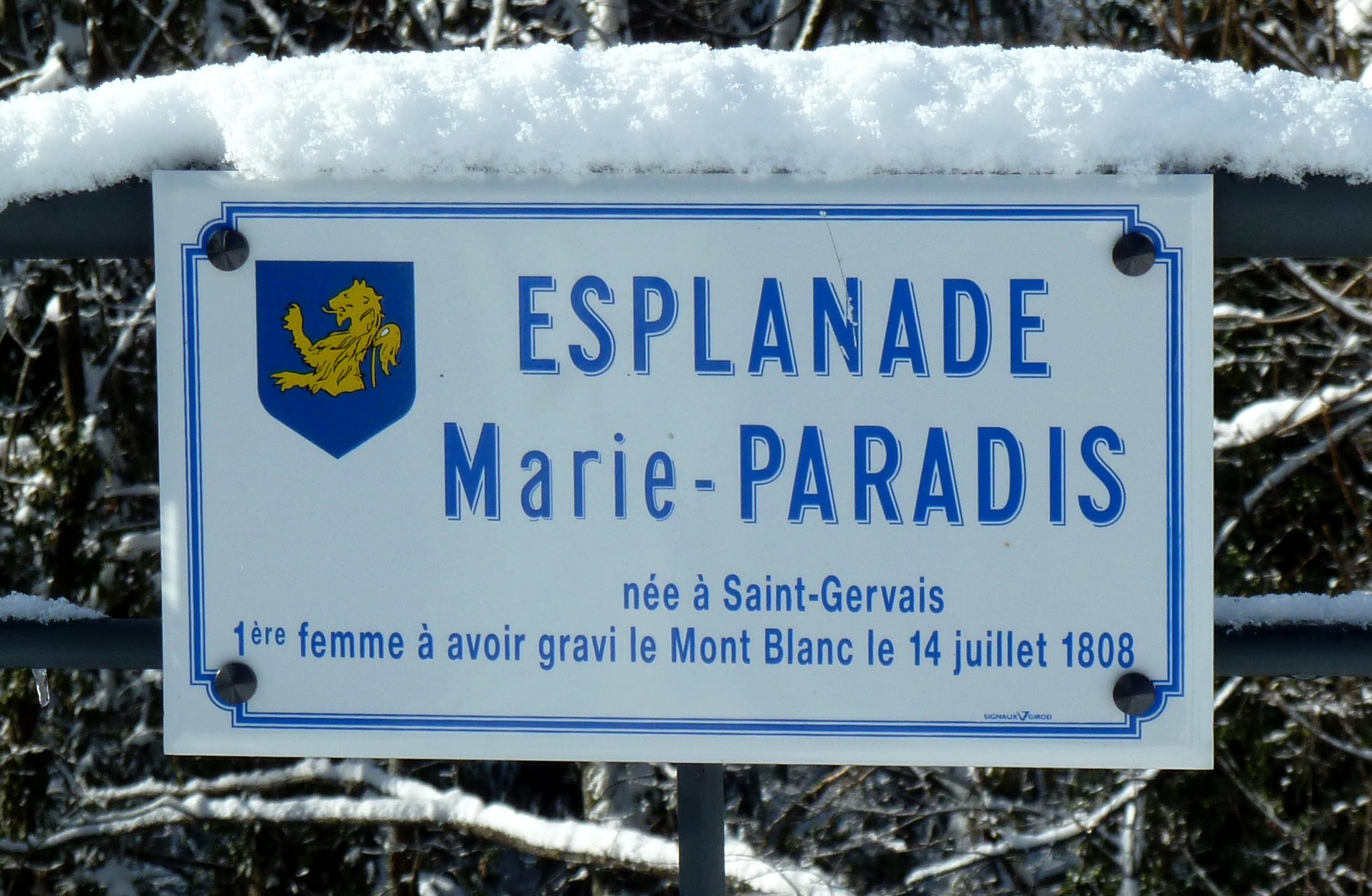 Plaque Esplanade Marie-Paradis à Saint-Gervais-les-Bains (Haute-Savoie)